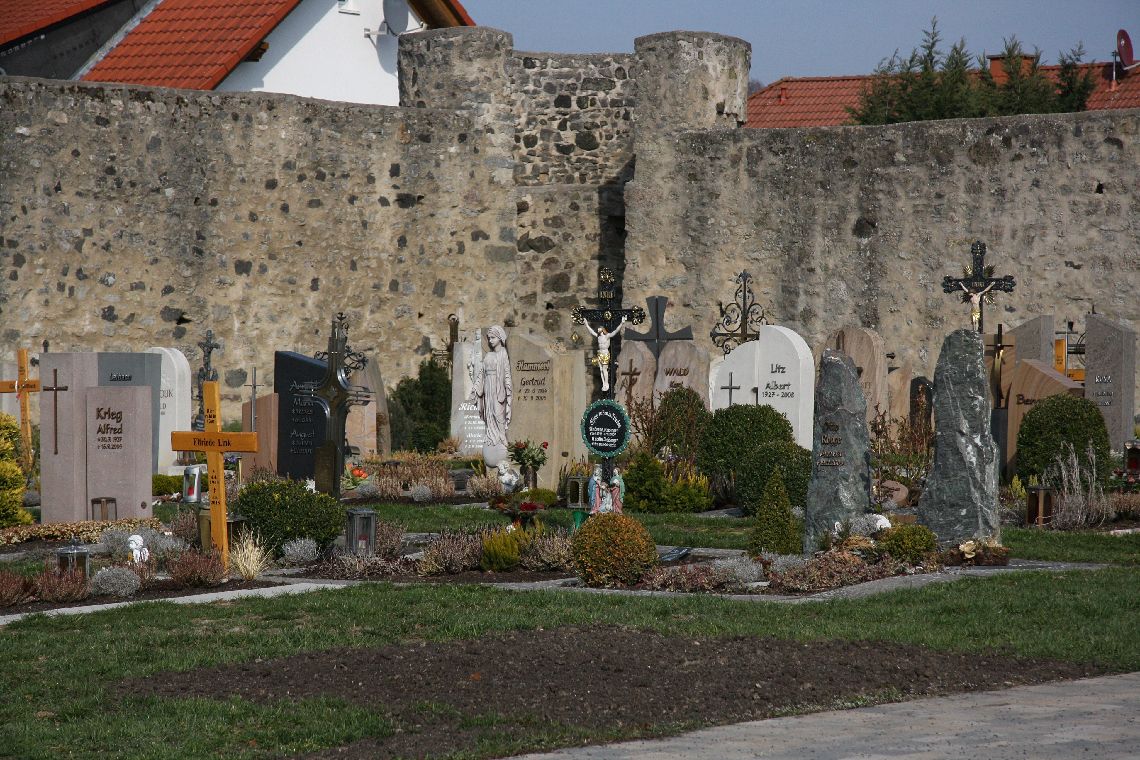 Wehrfriedhof: Ein von Befestigungsmauern umgebener Friedhof; Rasdorf, Landkreis Fulda, Hessen